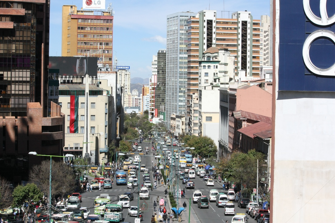 Avenida Mariscal Santa Cruz